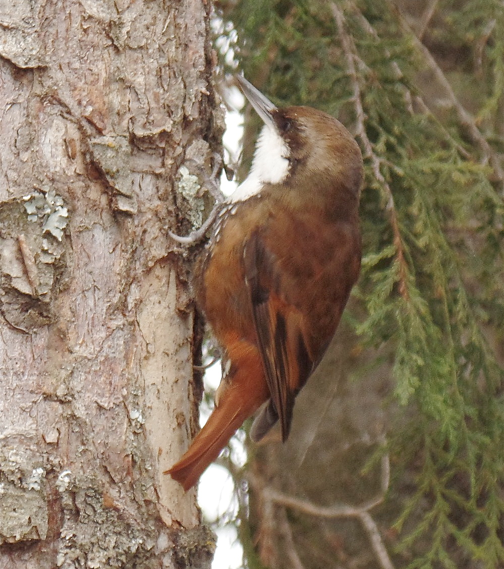 Picolezna comiendo gusanos de un arbol